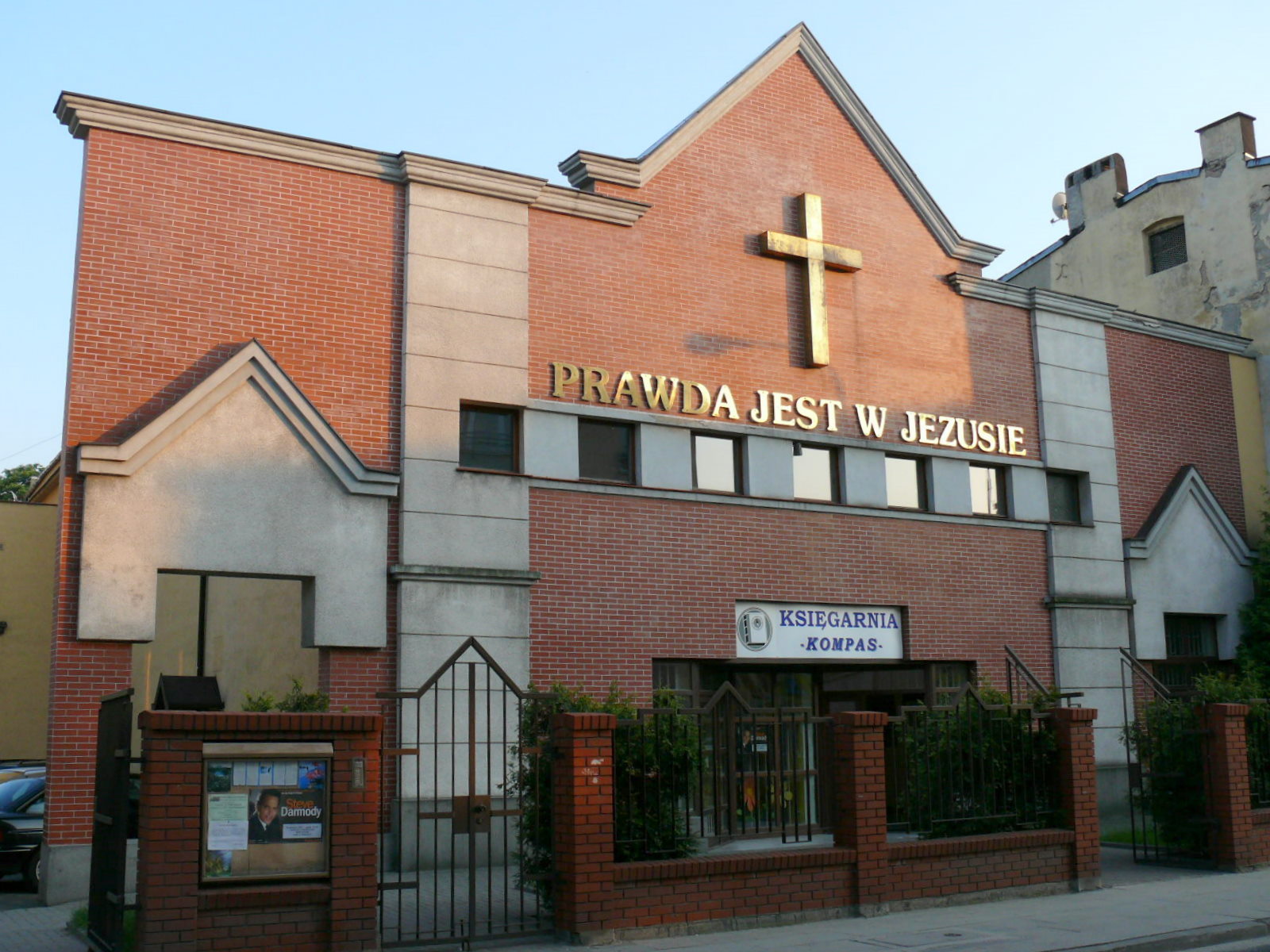 Kościół Chrześcijan Baptystów, Zbór Nawrot 27 Łódź